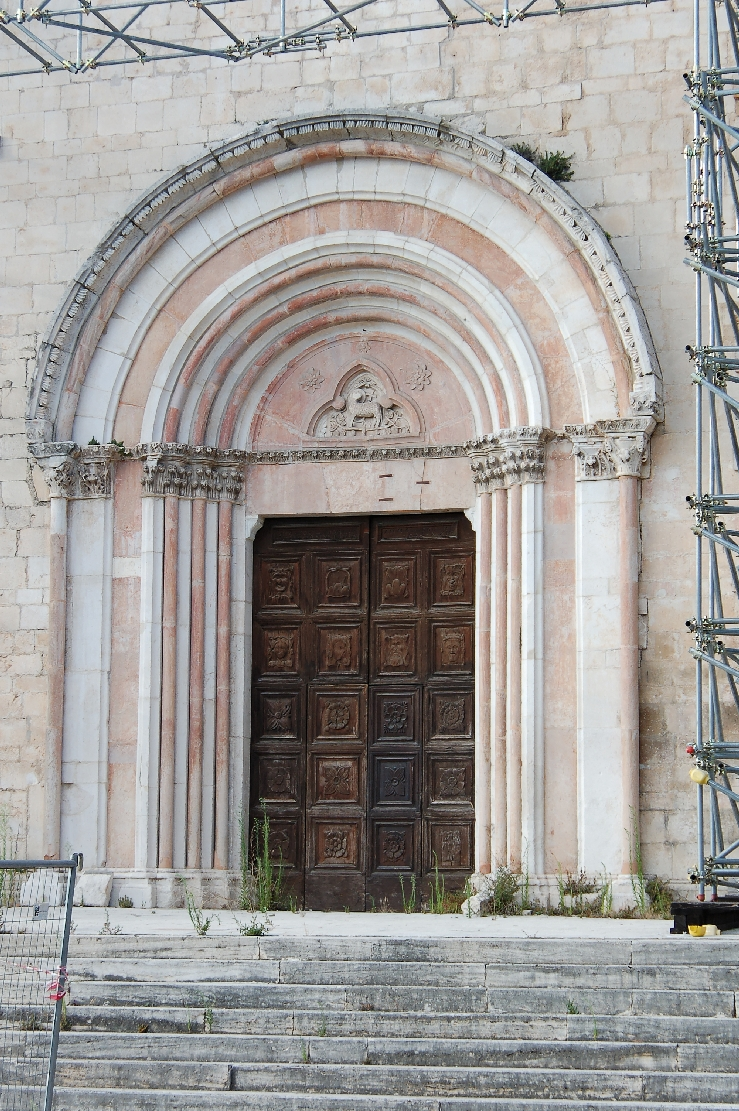 L'Aquila 2011